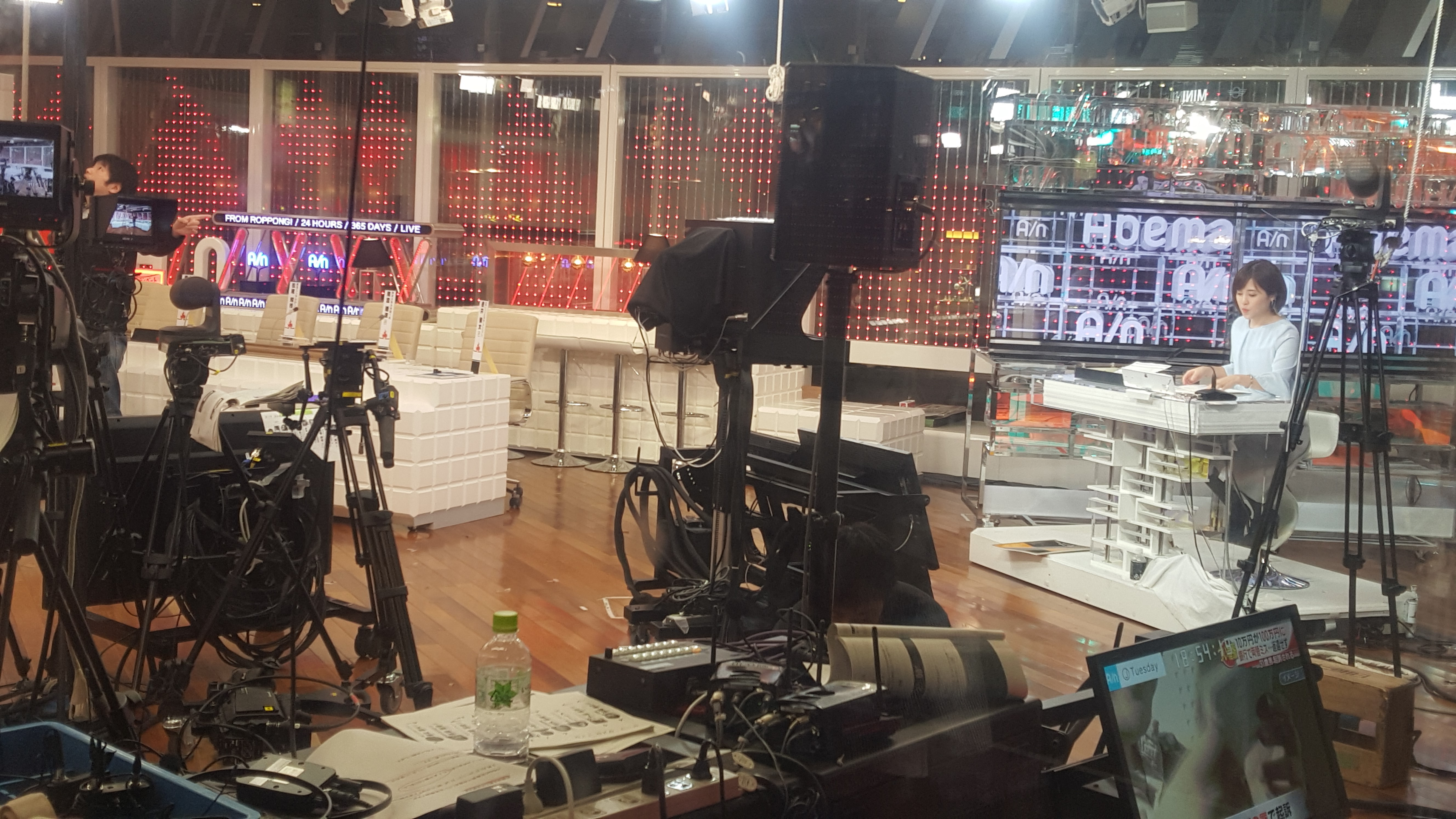 EX Keyakizaka studio